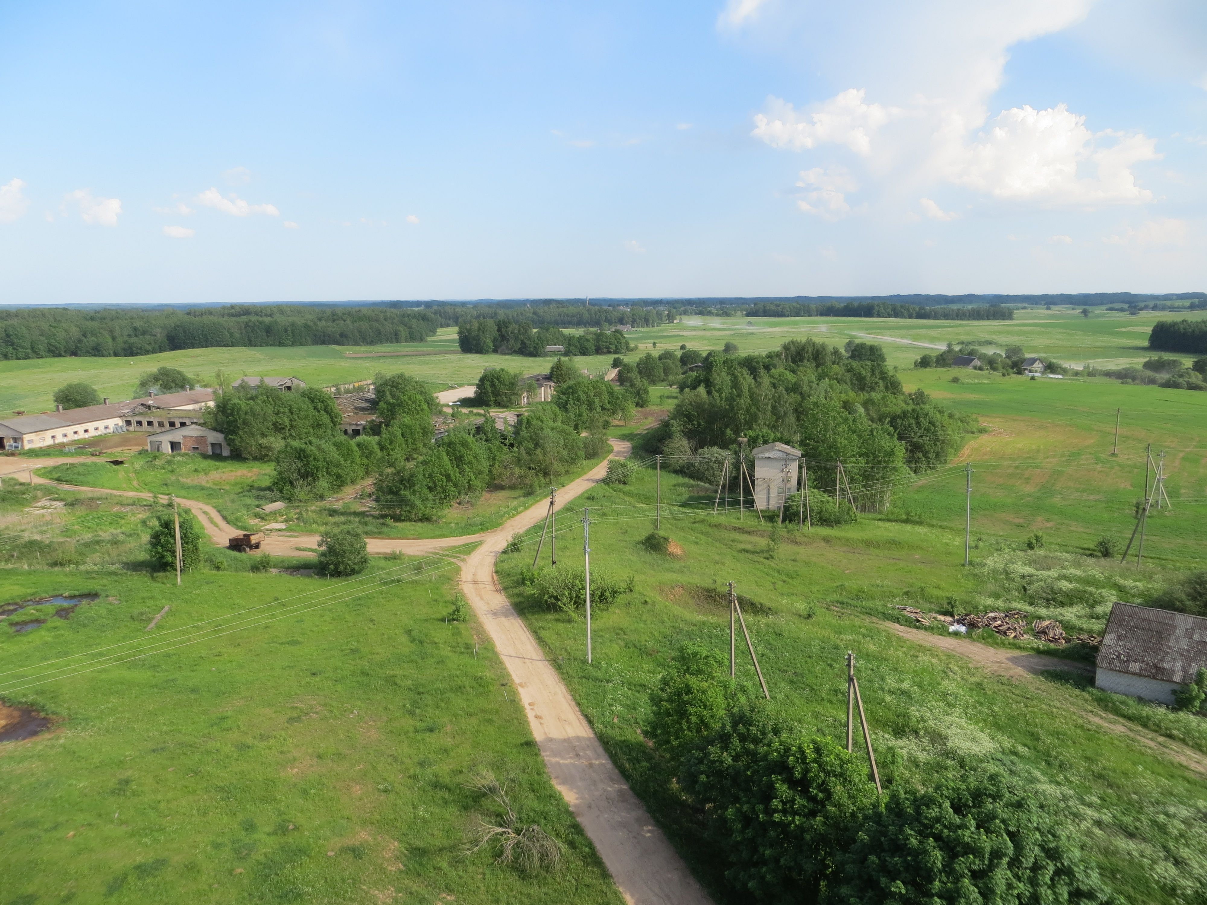 Imbrado sen., Lithuania